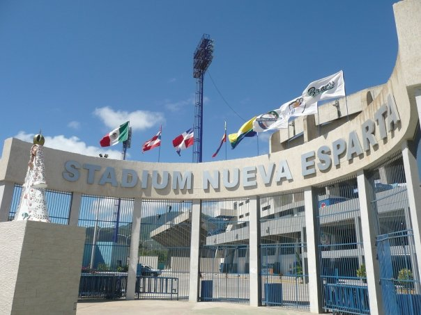 Guatamare